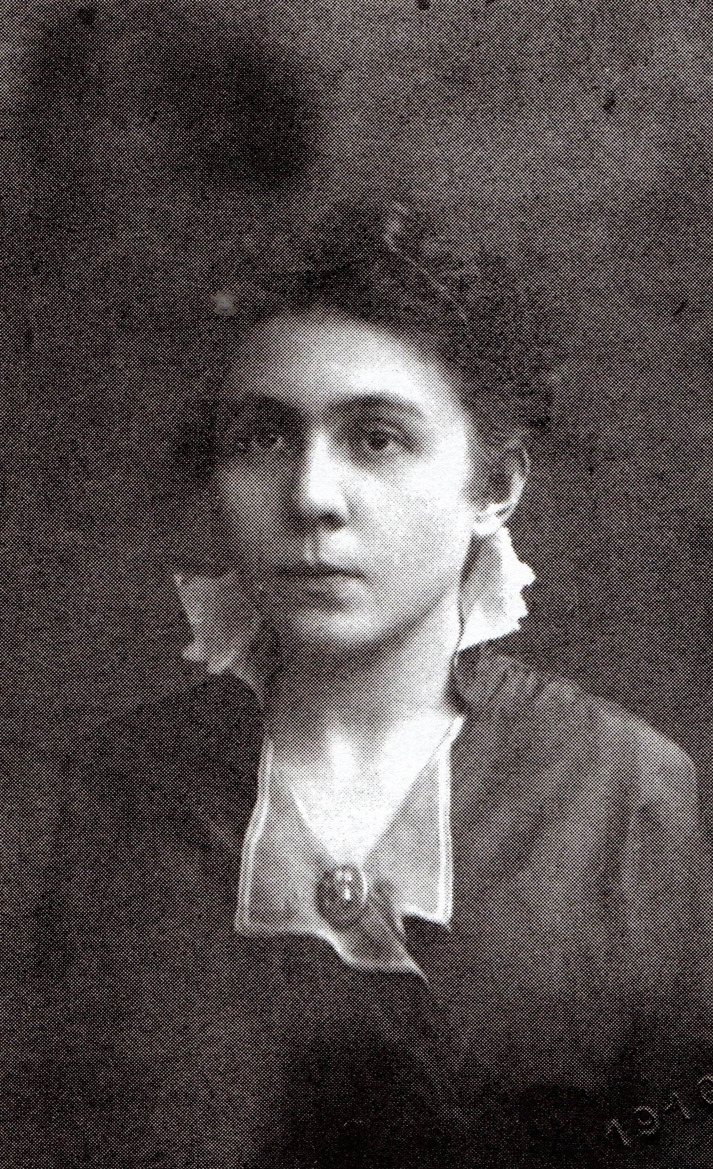 Jarmila Čapková, 1916